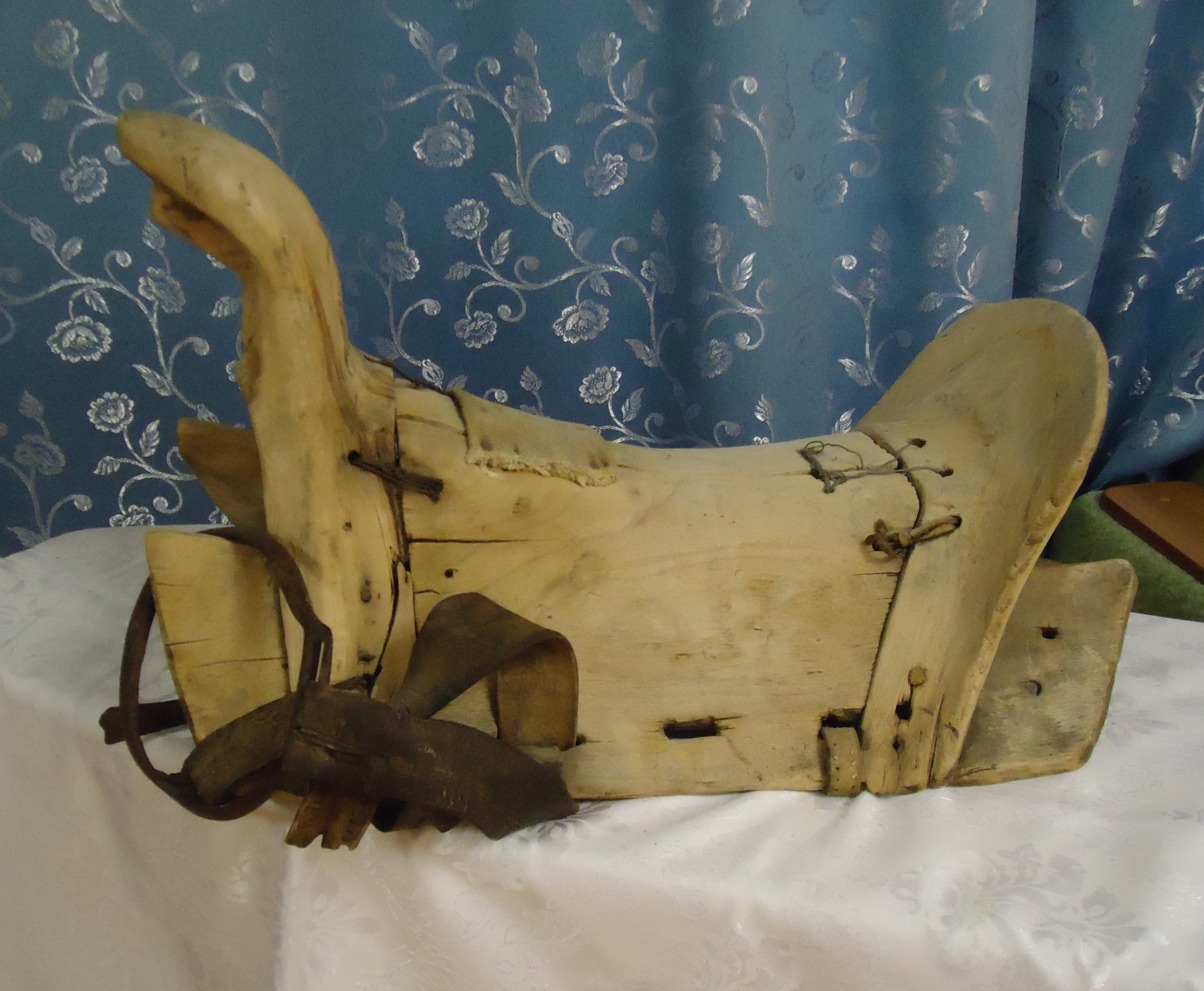 Ҡатай эйәре. 1930-сы йй